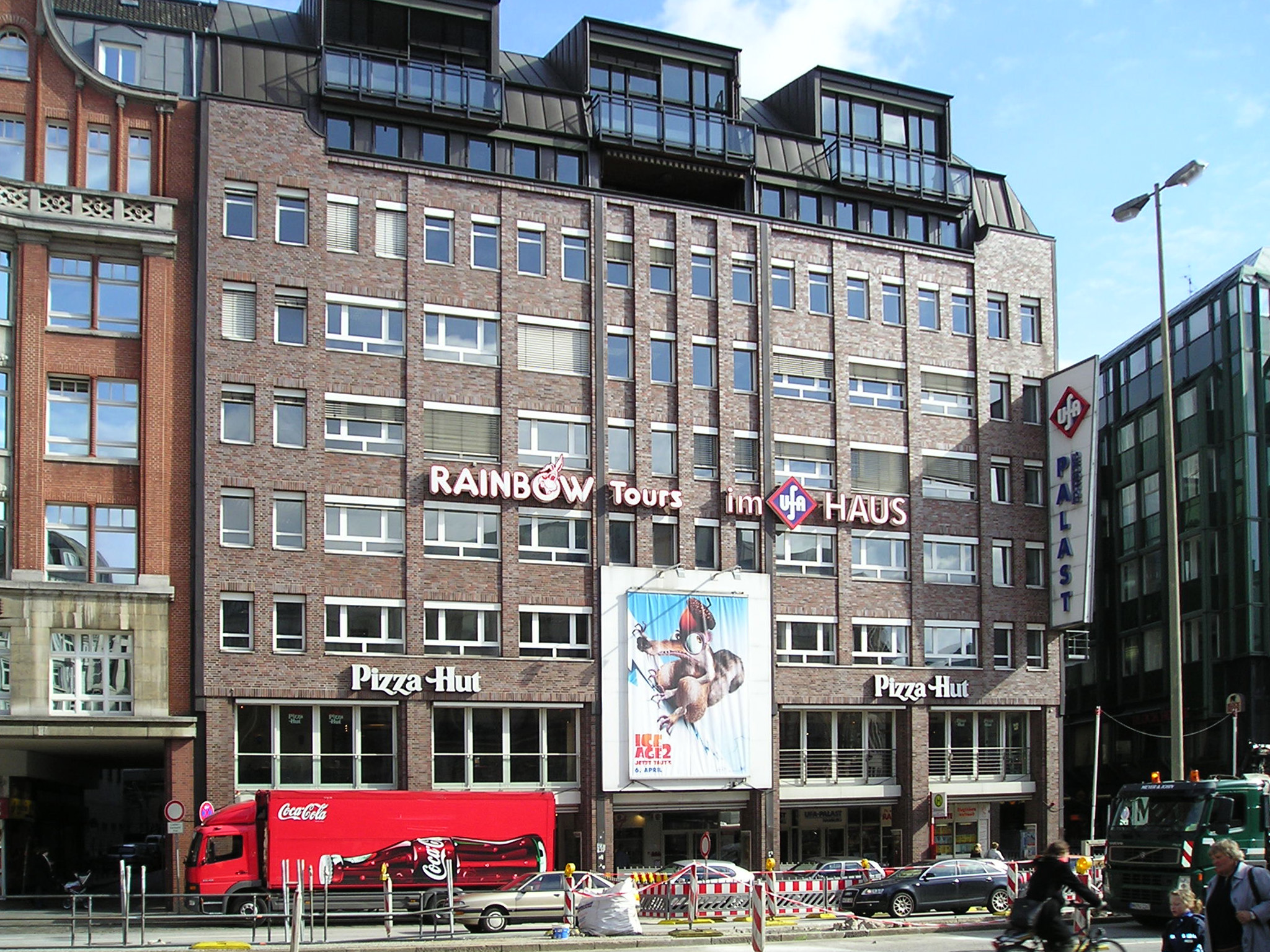 Hamburg, Gänsemarkt, Ufa-Haus, Foto: April 2006